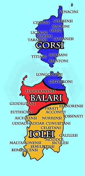 Mappa delle principali etnie nuragiche . Fonti: Giovanni Ugas - L'alba dei Nuraghi , Tavola XV pg.159 Claudio Tolomeo - Geografia